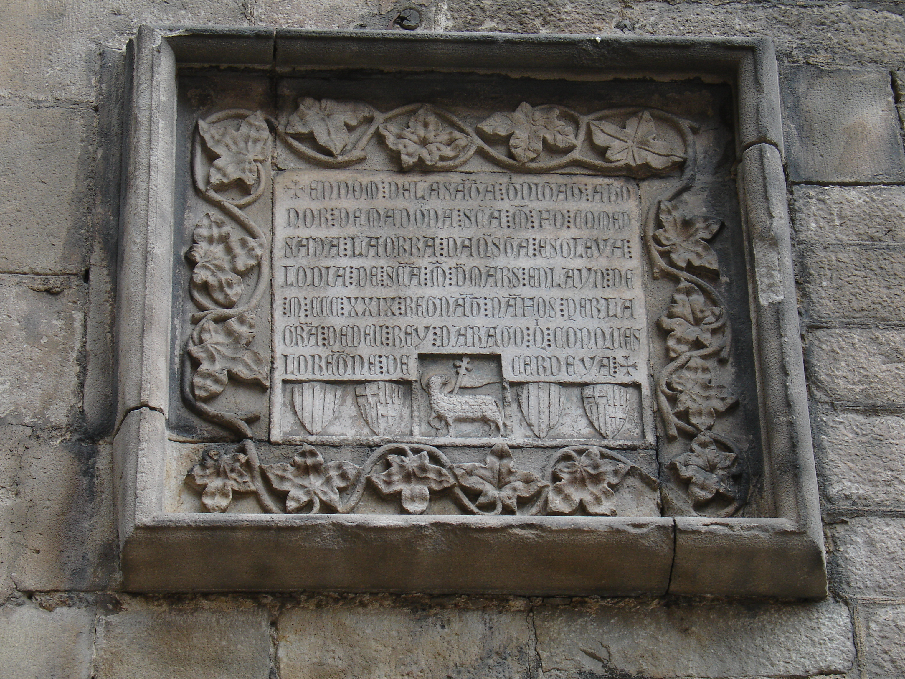 Transcripció: "En nom de la Santa Trinitat a ho / nor de Sancta Maria fo comen / sada la obra d·aquesta esgleya / lo dia de Sancta Maria de Mars en l·ayn de / MCCCXXIX regnant N·anfós per la / gràcia de Déu Rey d'Aragó qui conqués / lo regne de Cerdeya"